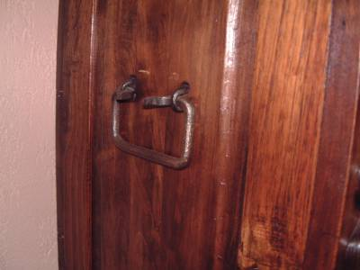 Je suis l'auteur de la photo et de réalisateur du meuble.